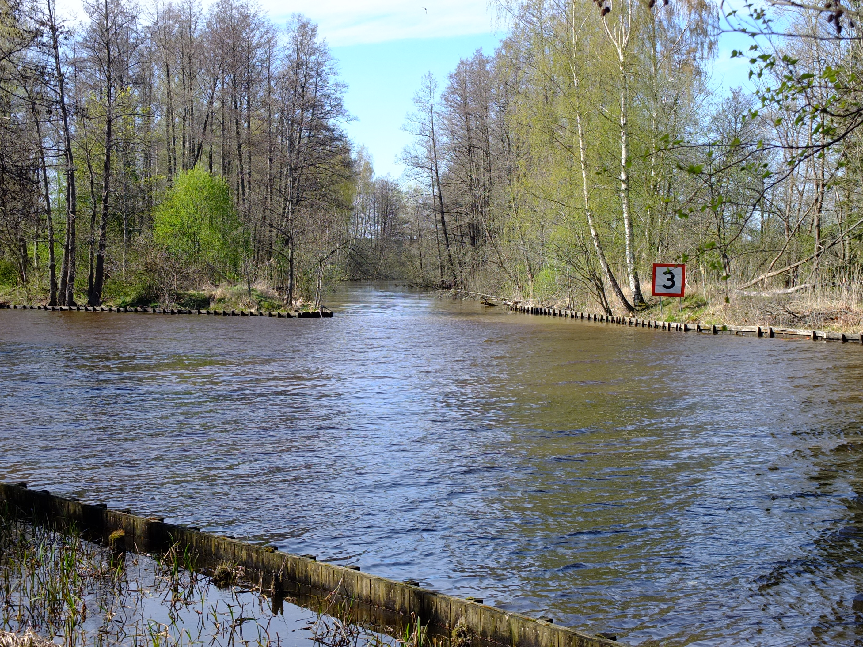 Lillåns utflöde i Svartån, Örebro